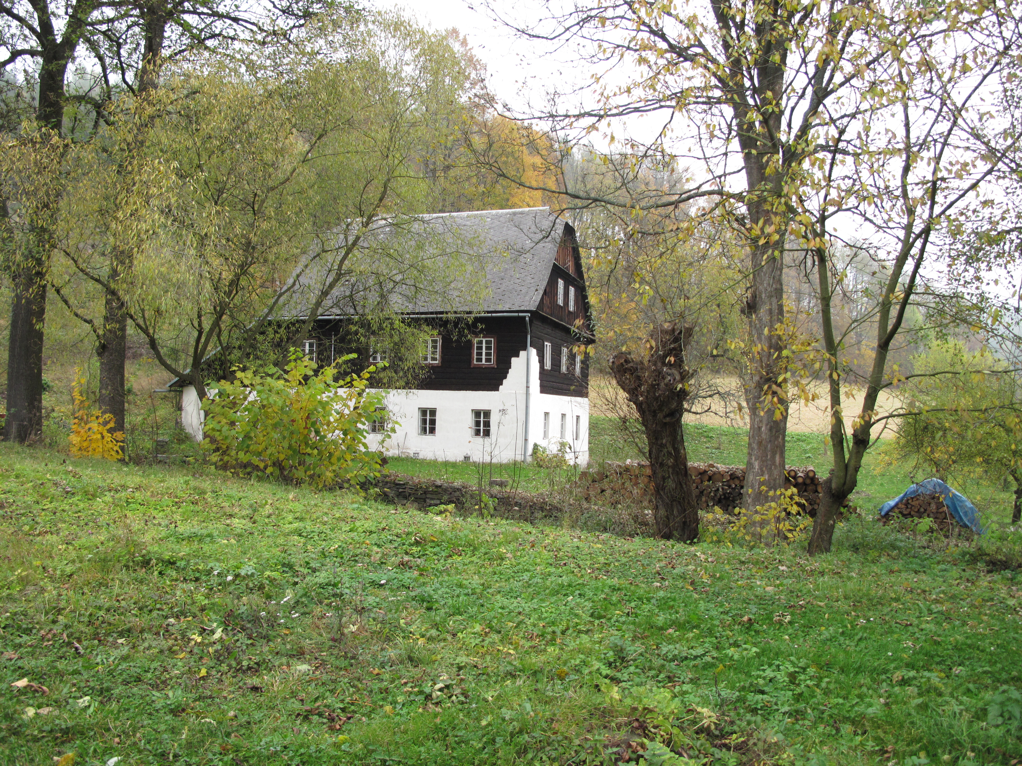 Křížová (Hošťálkovy). Okres Bruntál, Česká republika.